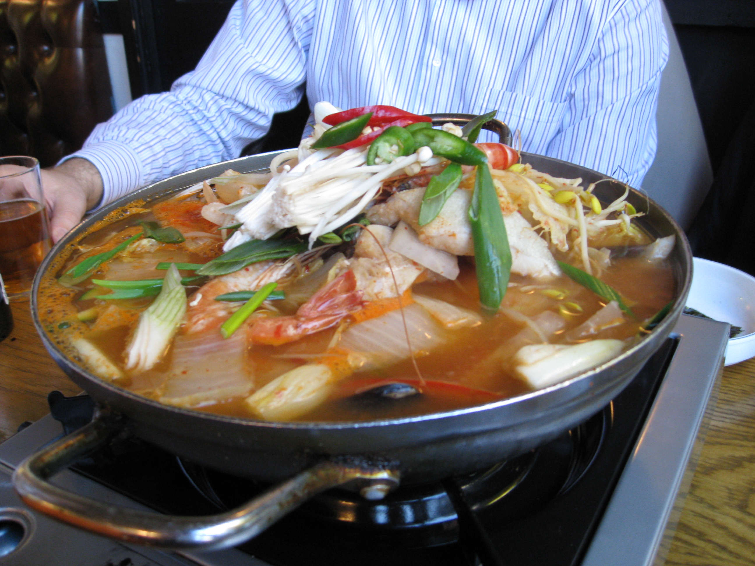 Haemul jeongol, a Korean stew